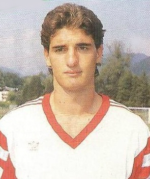 Il calciatore Lorenzo Amoruso Figurina Il grande calcio Vallardi 1989